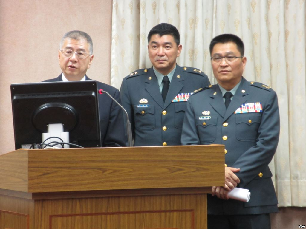 中華民國國防部副部長楊念祖（左）、國防部作戰及計畫參謀次長室次長陳寶餘（中）在立法院接受質詢。